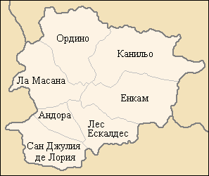 Любомир Таушанов, 2005 г.